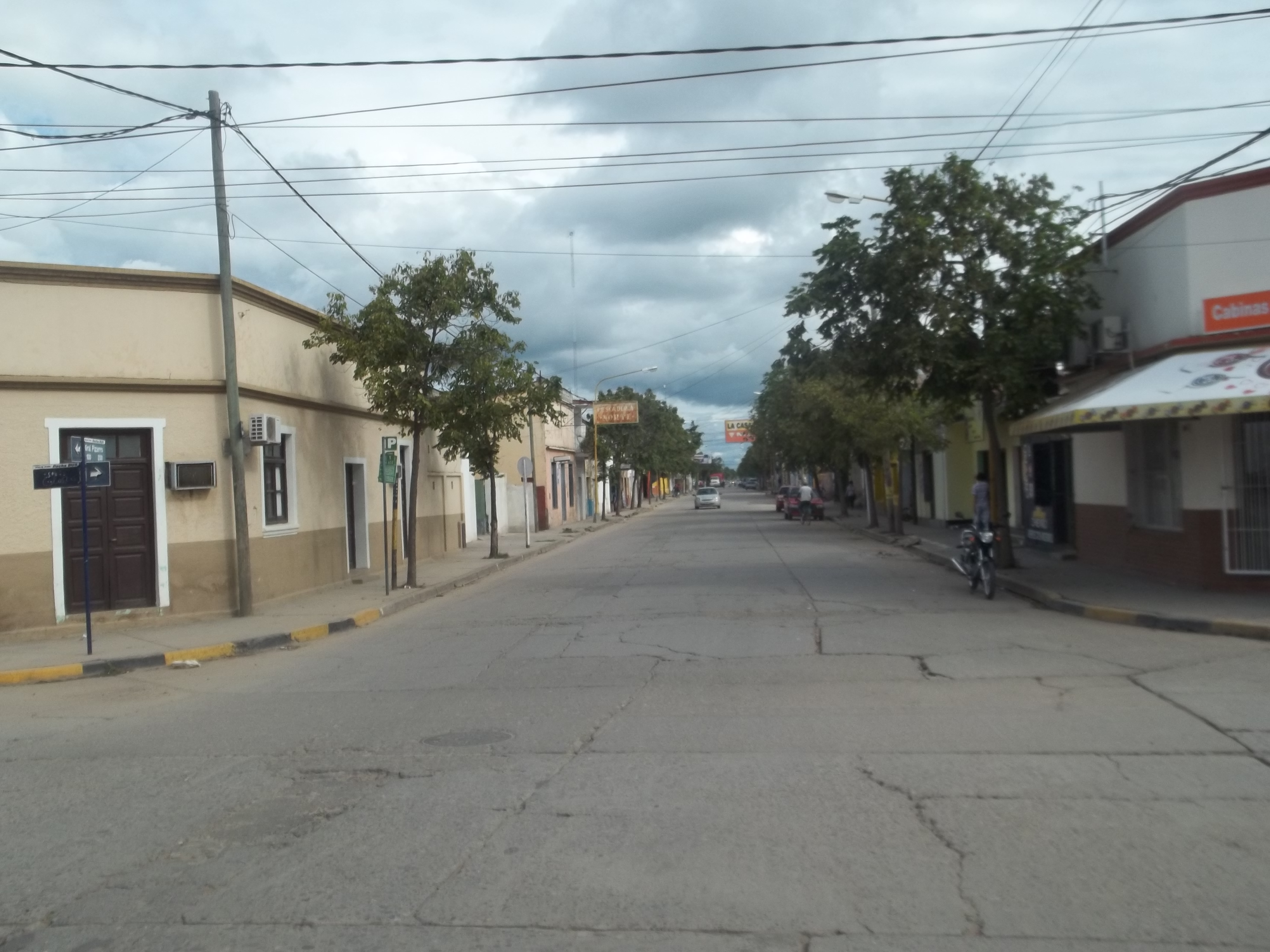 Vista de la calle Pellegrini (calle principal de San Ramón de la Nueva Orán, Salta, Argentina) al Sur en su intersección con calle España.